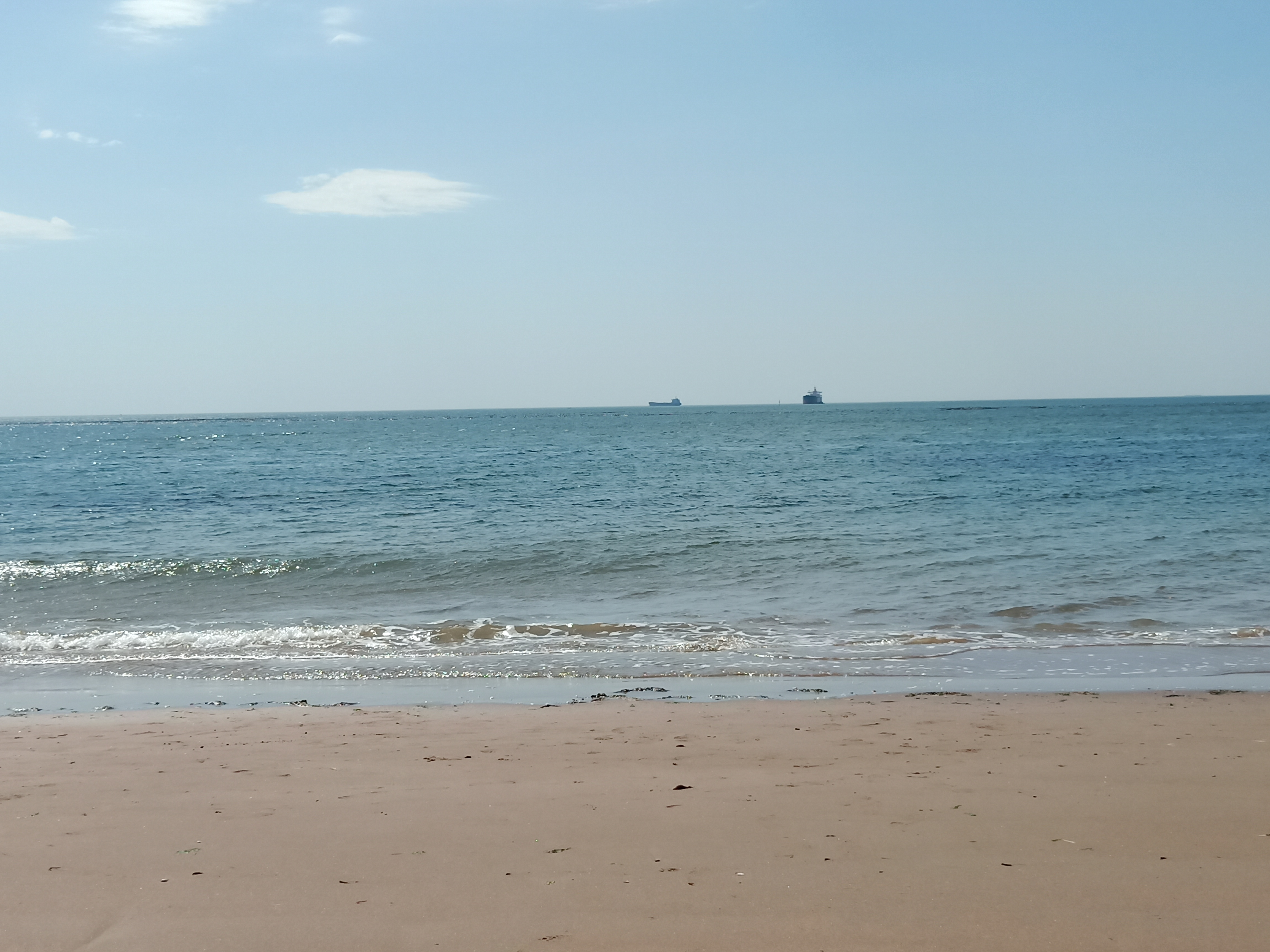 粵語: 喺河北秦皇島山海關區老龍頭近海邊望去渤海嗰邊